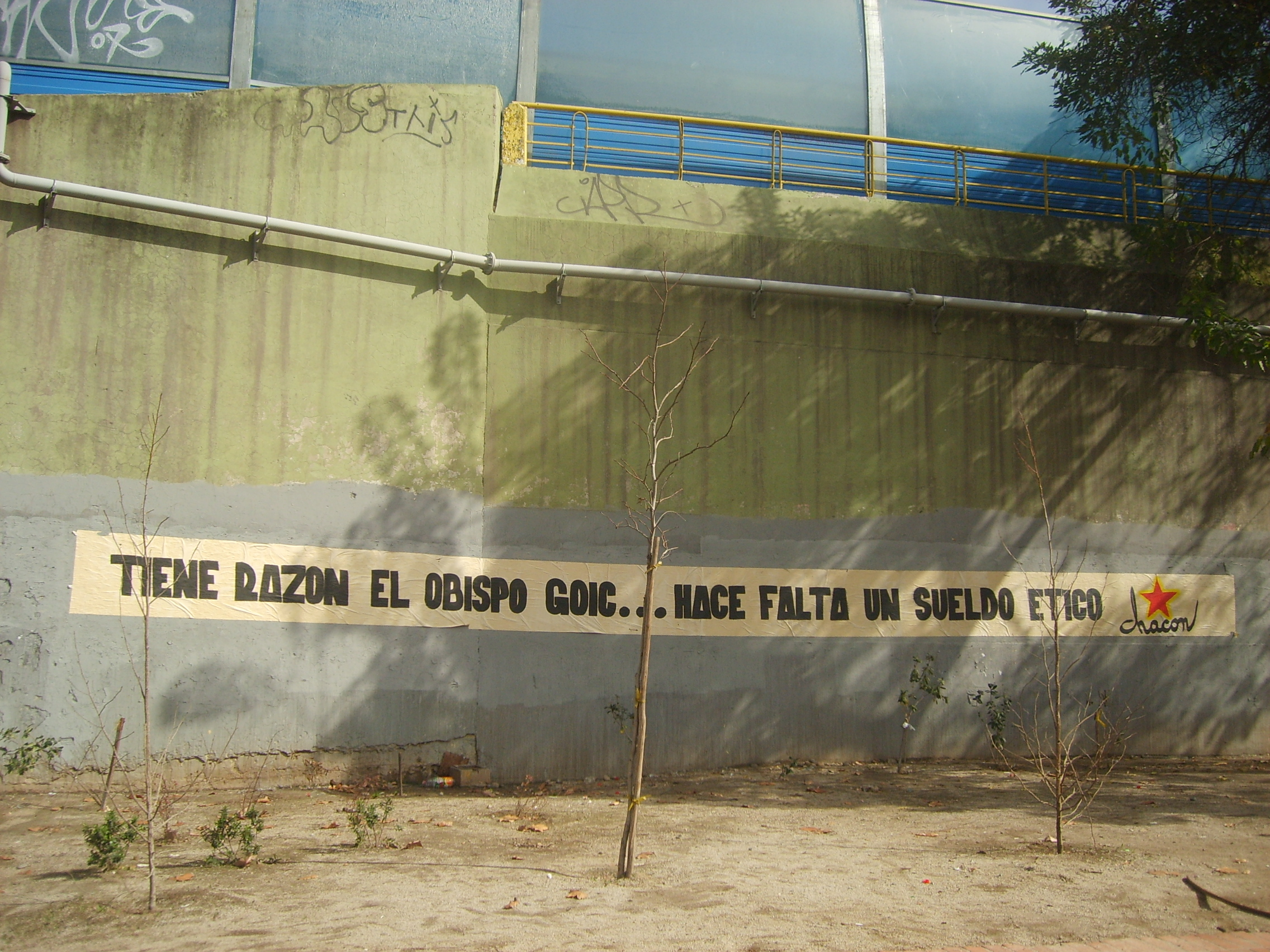 Fotografía de murales pintados en la Autopista Central